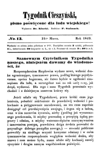 Front page of the Tygodnik Cieszyński magazine, 31 March 1849